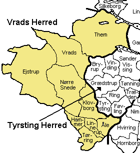 Vrads Herred, Skanderborg Amt, Denmark Source: Map by Svend-Erik Christiansen